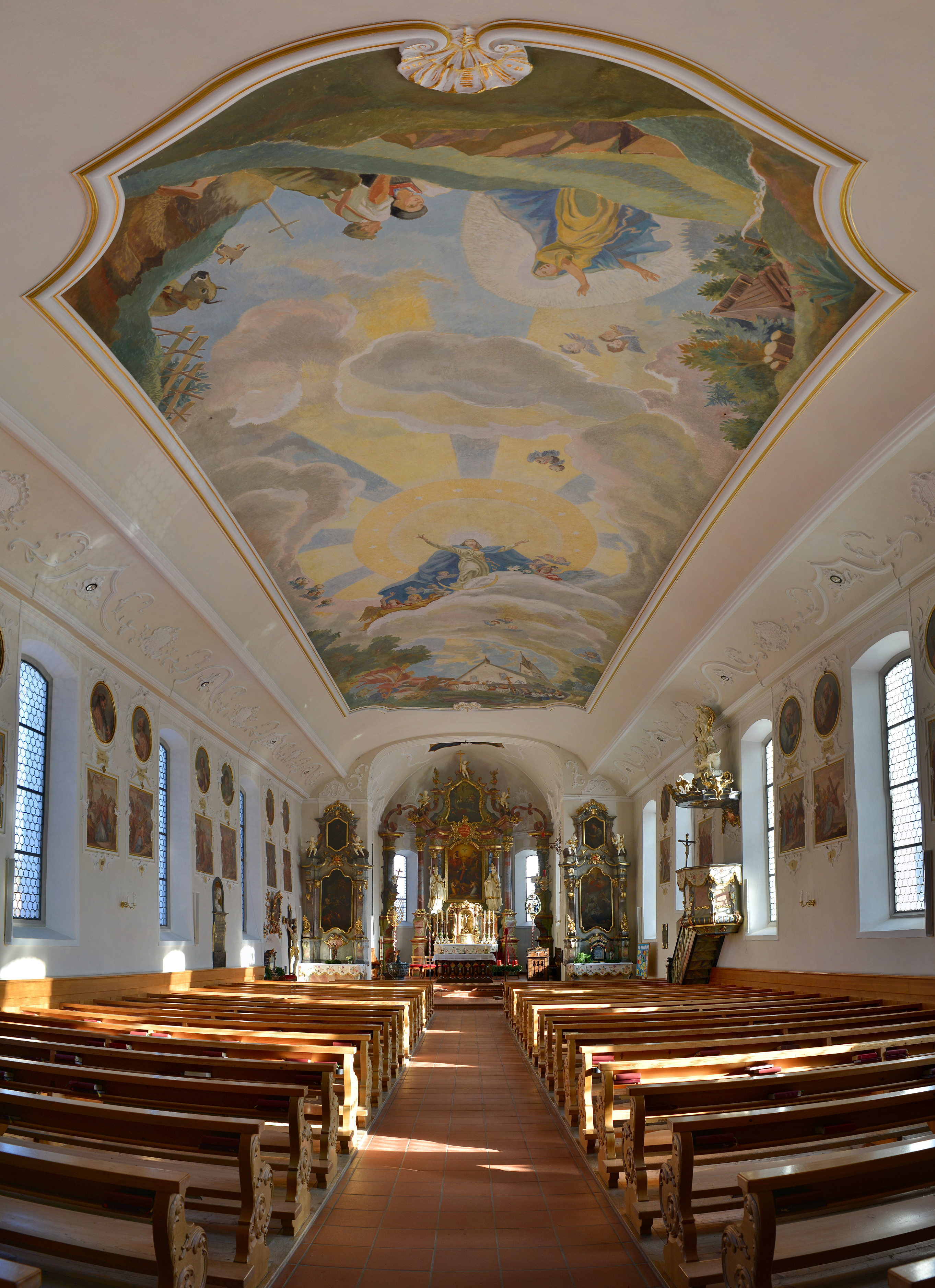 Pfarrkirche Heiligste Dreifaltigkeit von Schwarzenberg in Vorarlberg.